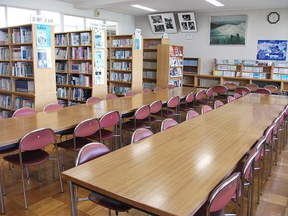 学校内：図書室